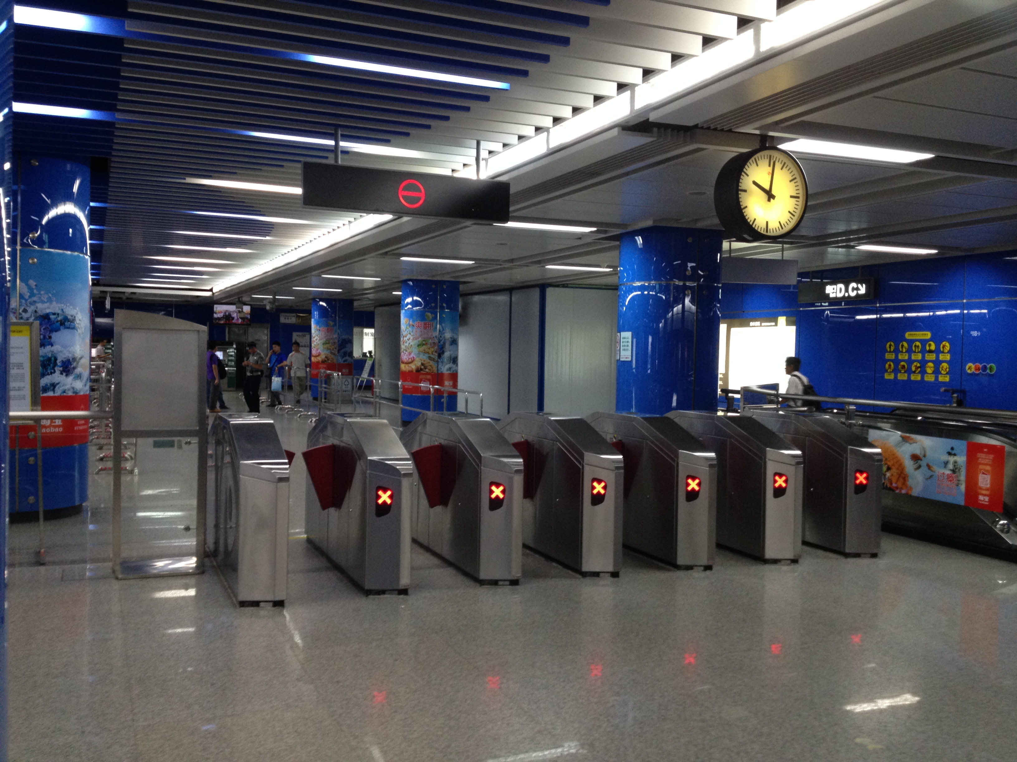 广州地铁万胜围站南站厅